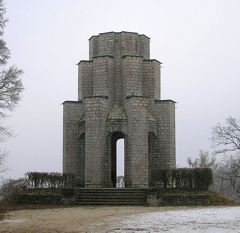 Burg Treuchtlingen (Obere Burg, Landkreis Weißenburg-Gunzenhausen, Mittelfranken). Kriegerdenkmal (1926) östlich vor der Ruine. Eigene Aufnahme, Dez. 2007 / Treuchtlingen castle (Upper castle, Middle Franconia, Bavaria, Germany). War memorial (1926) east of the castle. Own photo, Dec. 2007